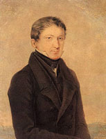 Н.И. Уткин «Портрет М.И. Муравьева-Апостола» (1823–1824, Государственный литературный музей, Москва).